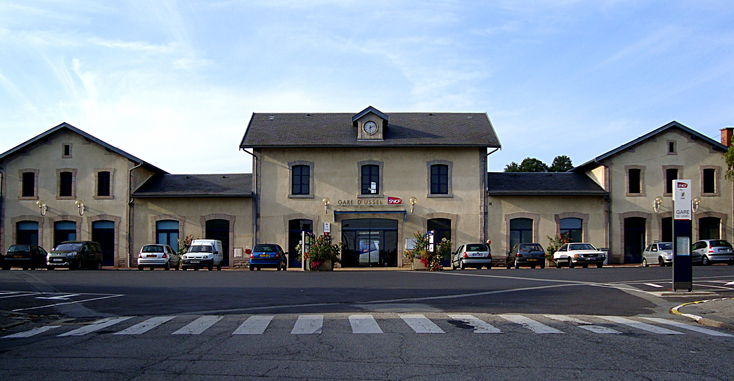 La gare d’Ussel (Corrèze, Limousin, France).